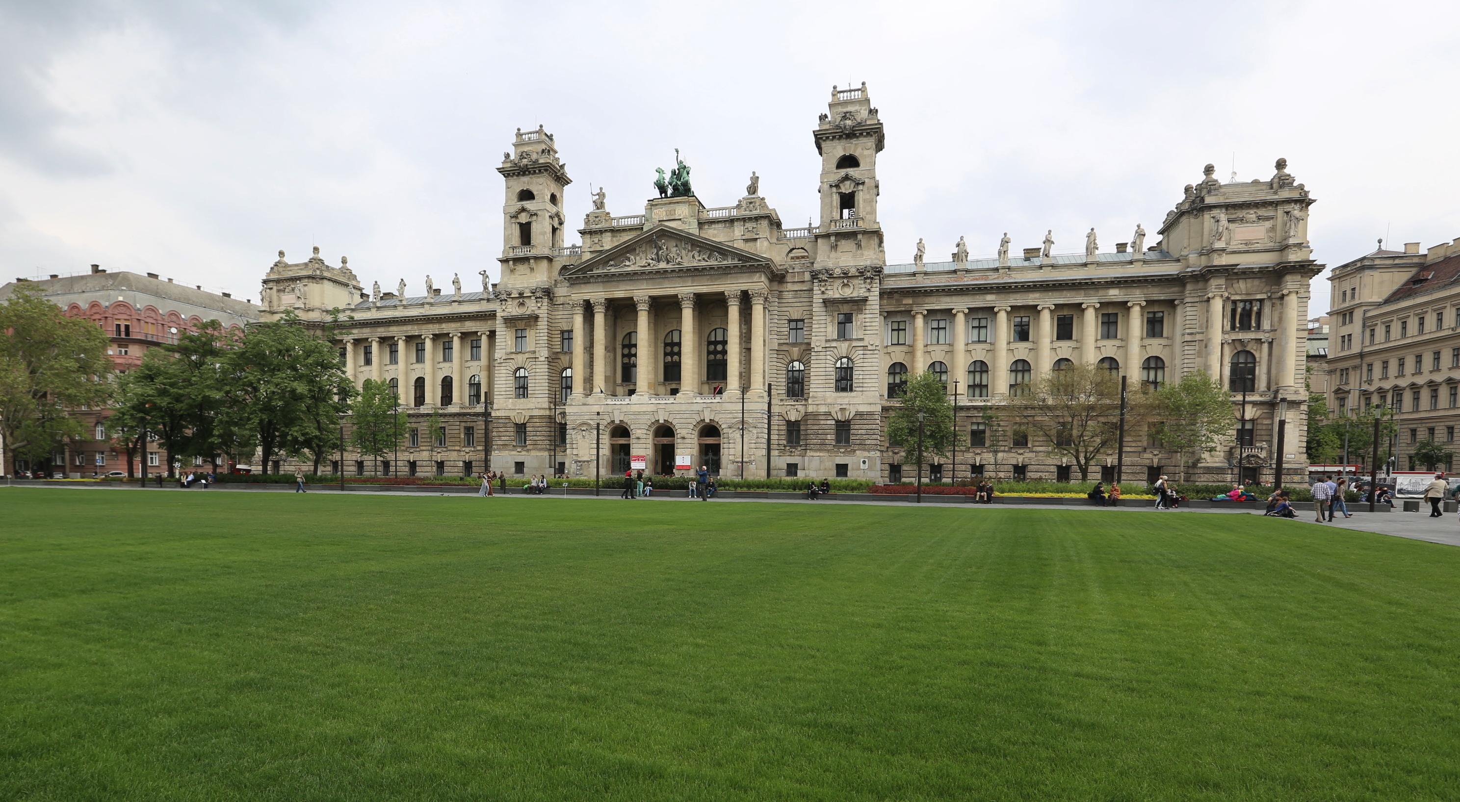 az egykori Kúria számára, Hauszmann Alajos tervezte, 1893-tól épült. 1975-ig a Magyar Nemzeti Galéria, 2018-tól Néprajzi Múzeum épülete Budapesten, a Kossuth téren